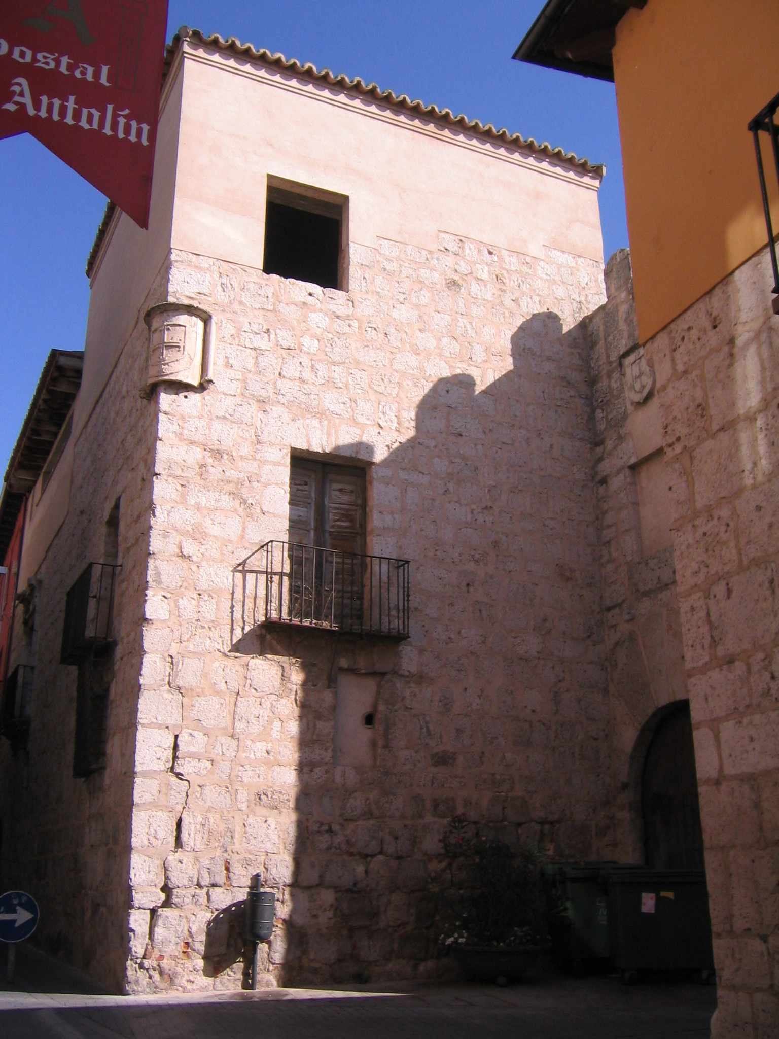 Edificio en Tordesillas (Valladolid) España.